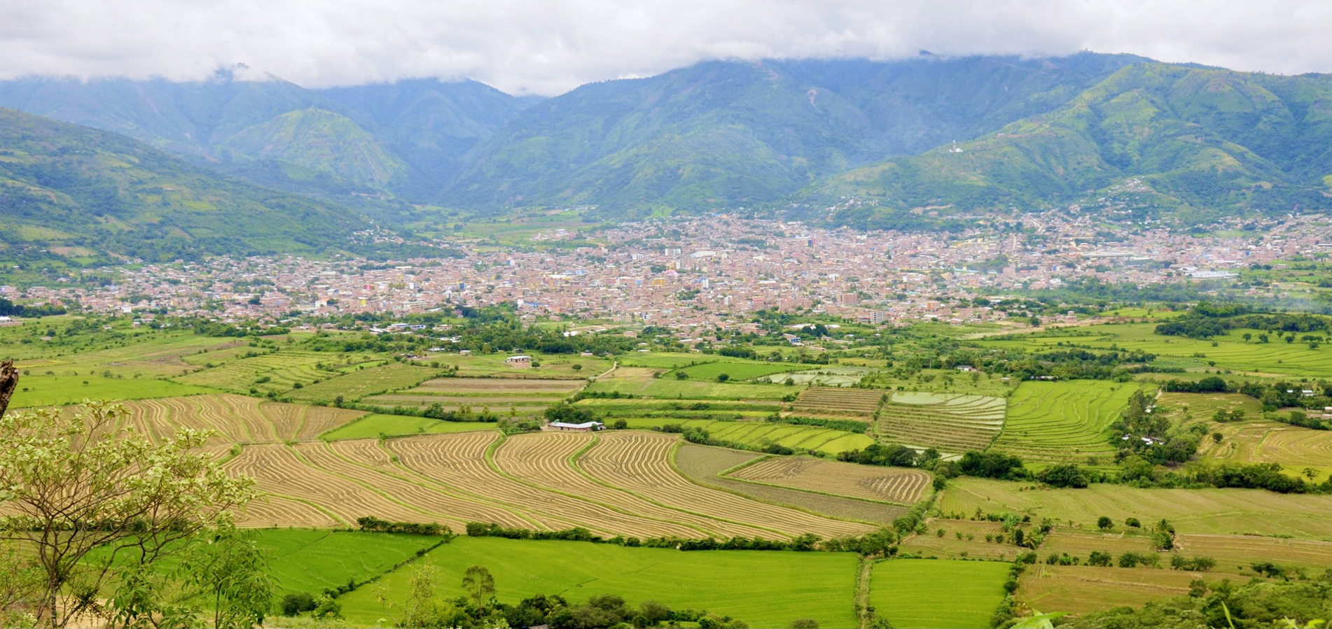 Vista panorámica de Jaén, desde el cerro en el Sector Santa Teresita